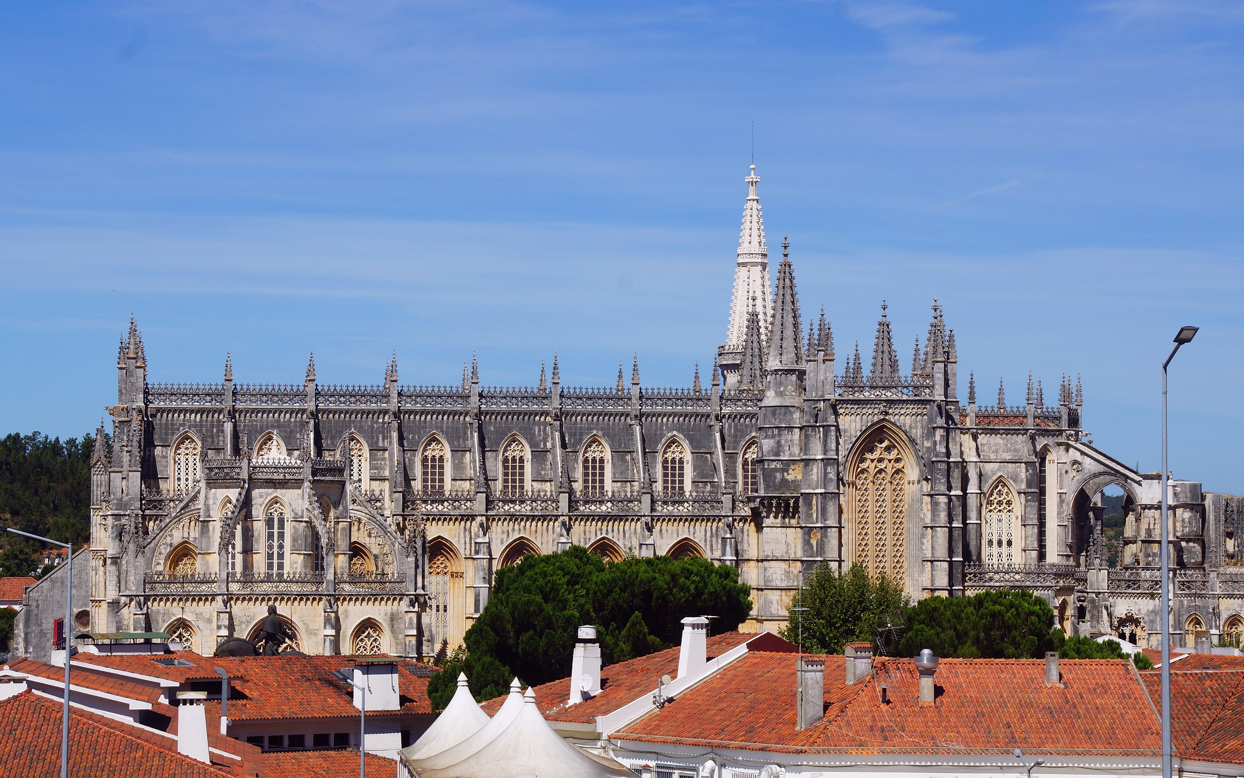 Dominikaner_Kloster Mosteiro de Santa Maria da Vitória da Batalha 14.-16.Jahrhundert. in der Totalen von Süden gesehen. Batalha liegt in der Prov. Leiria in Portugal Foto Wolfgang Pehlemann DSC00721